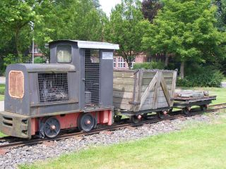 Kleinbahn des Augustfehner Stahlwerkes 28.07.2005